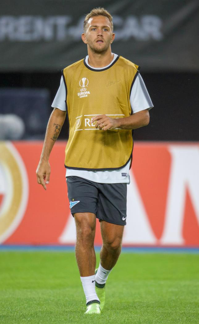 13.09.2017. Македония, Скопье, стадион «Филипп II Македонский». Тренировка основного состава ФК «Зенит» перед матчем Лига Европы УЕФА 2017/18, «Вардар» — «Зенит».